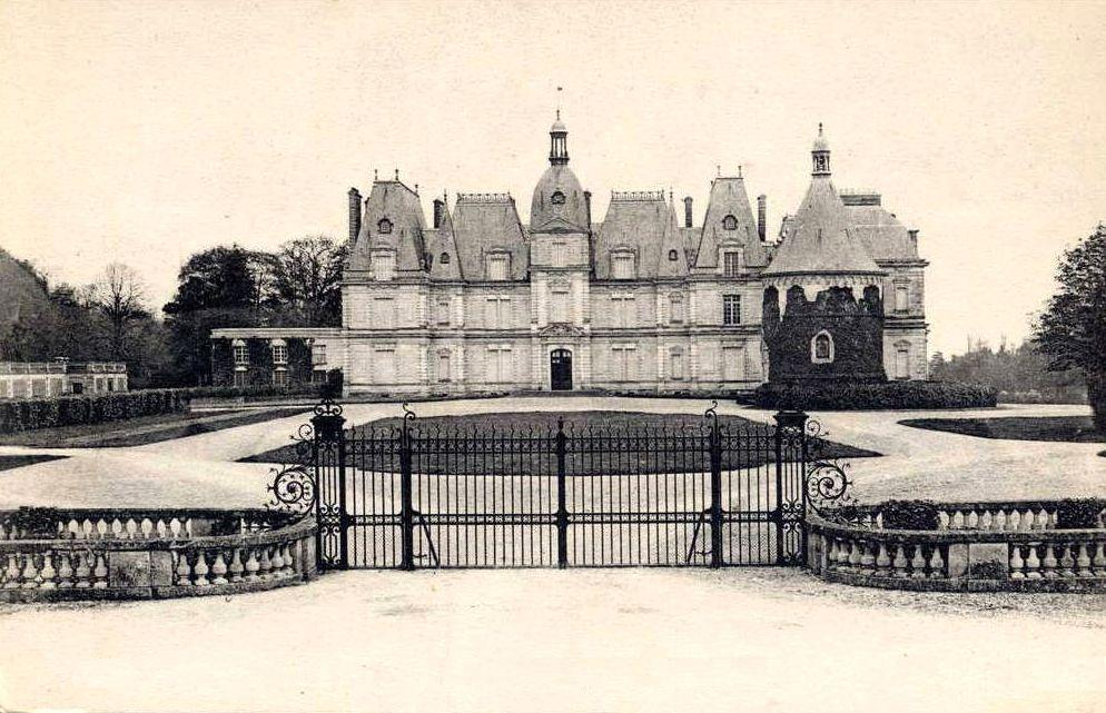 La façade sur la cour d'honneur, vue depuis la rue de la Forêt. La grille existe toujours.